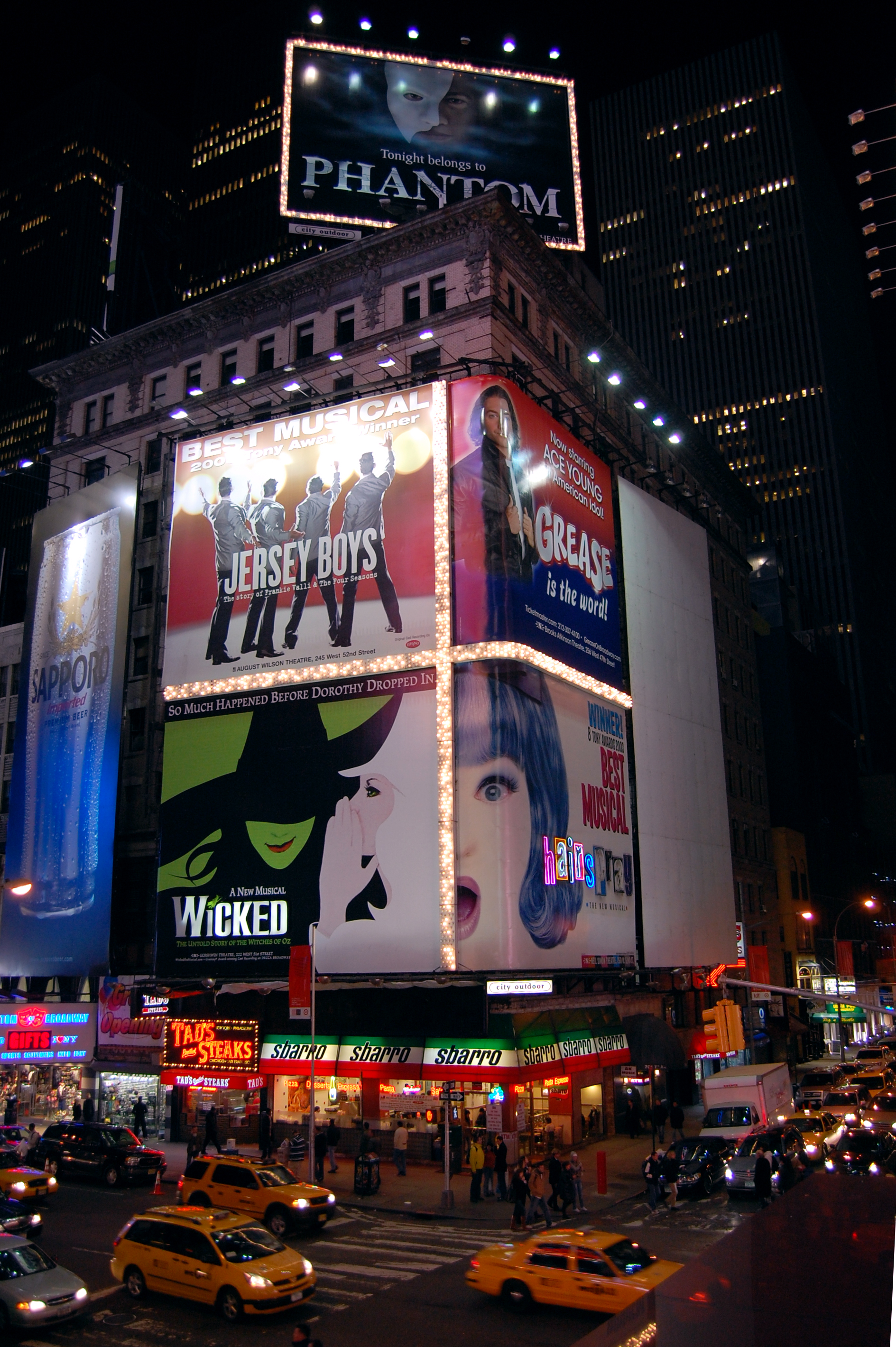 Musicals